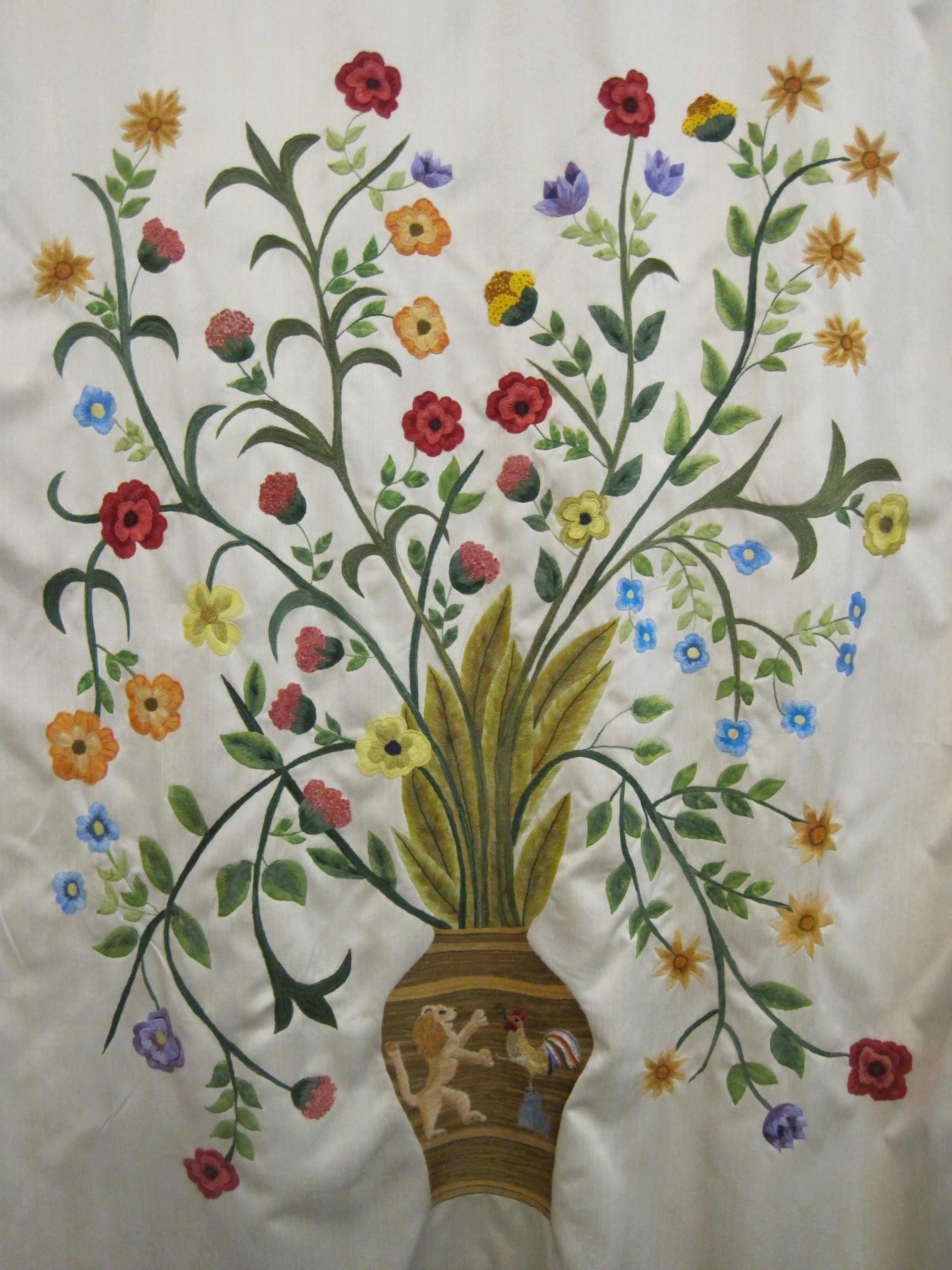 הפרוכת בבית הכנסת של קוניליאנו